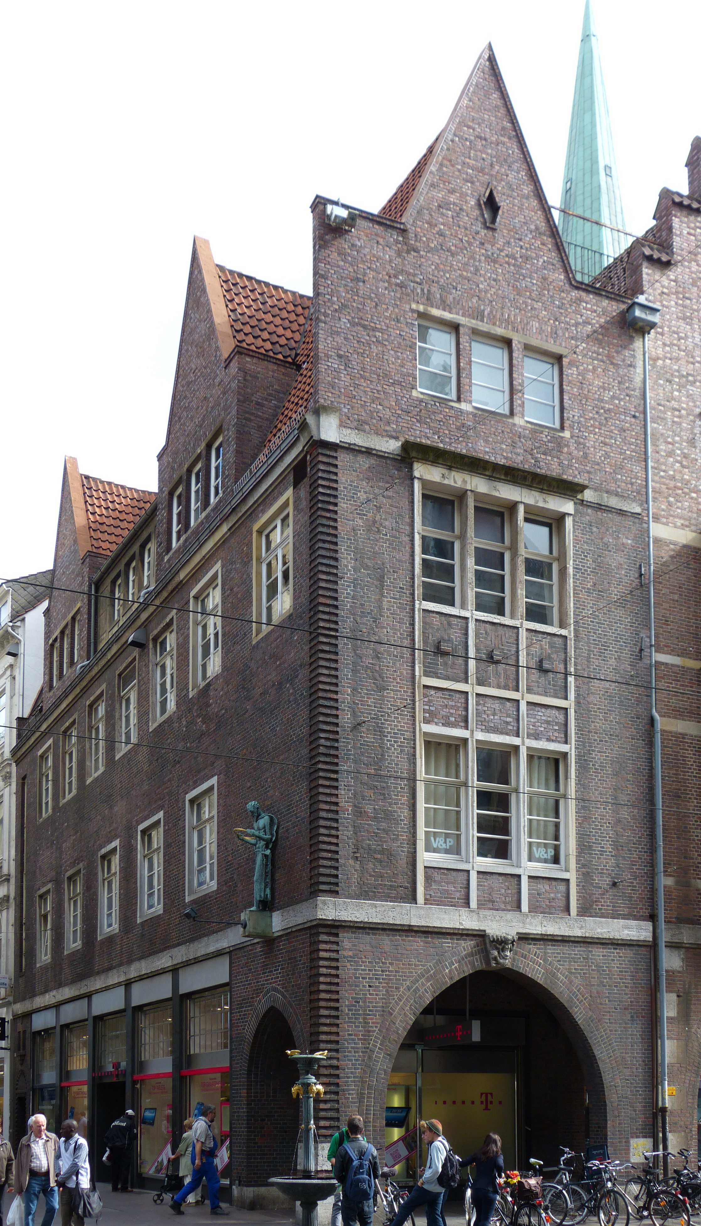 Brinkmann und Lange in Bremen, Sögestraße 1Das abgebildete Objekt ist ein geschütztes Kulturdenkmal in der Freien Hansestadt Bremen, mit der Nr. 1146 beim Landesamt für Denkmalpflege registriert.